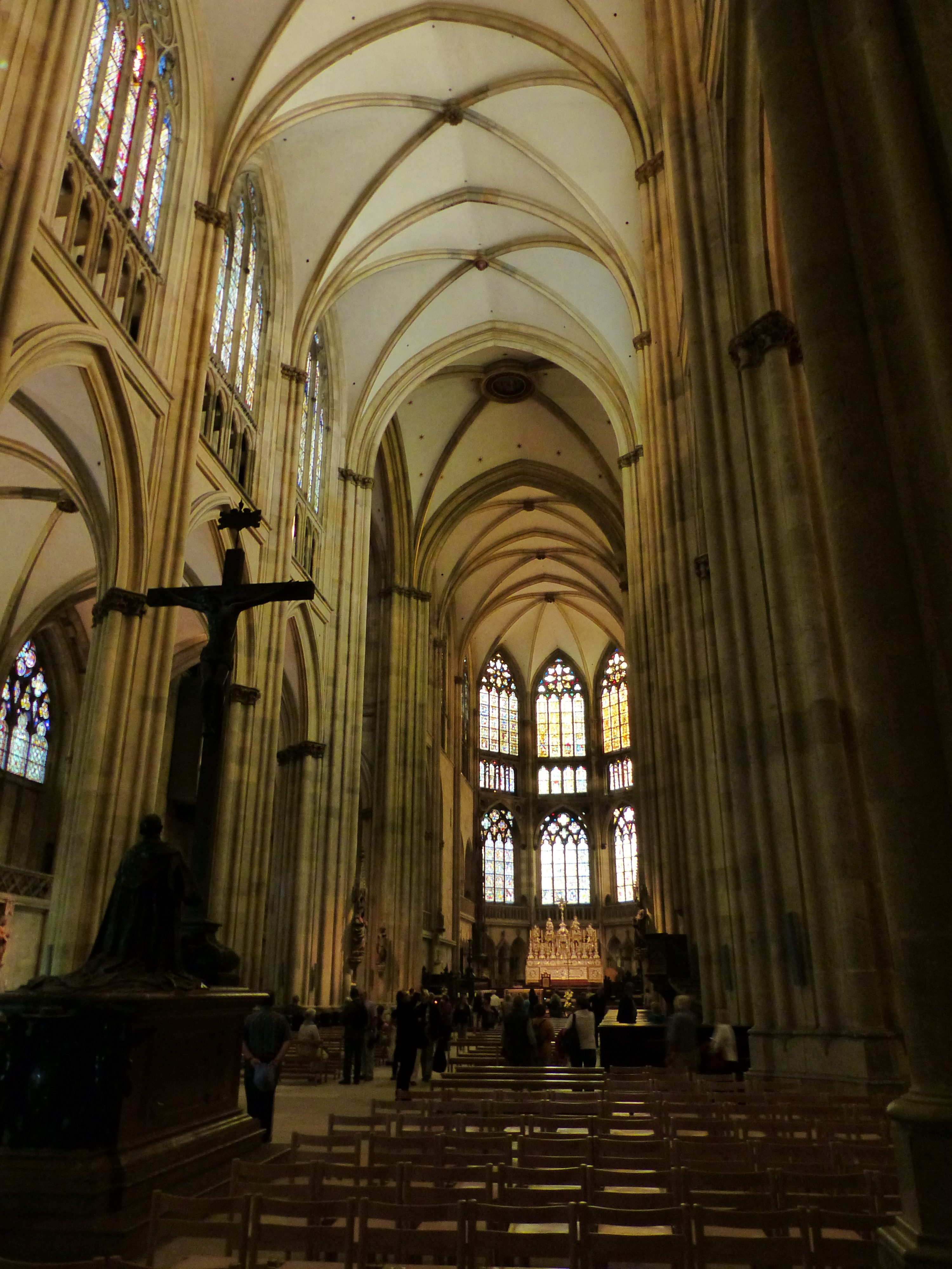 Regensburger DomThis is a photograph of an architectural monument.